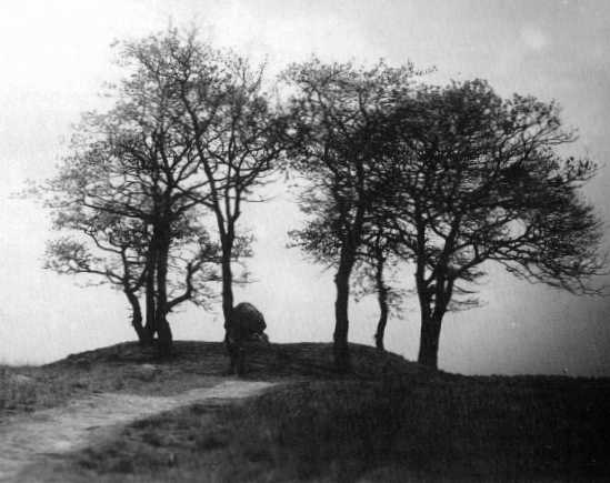 Hünengrab in Hamburg-Groß Flottbek vor seiner Zerstörung ca. 1870